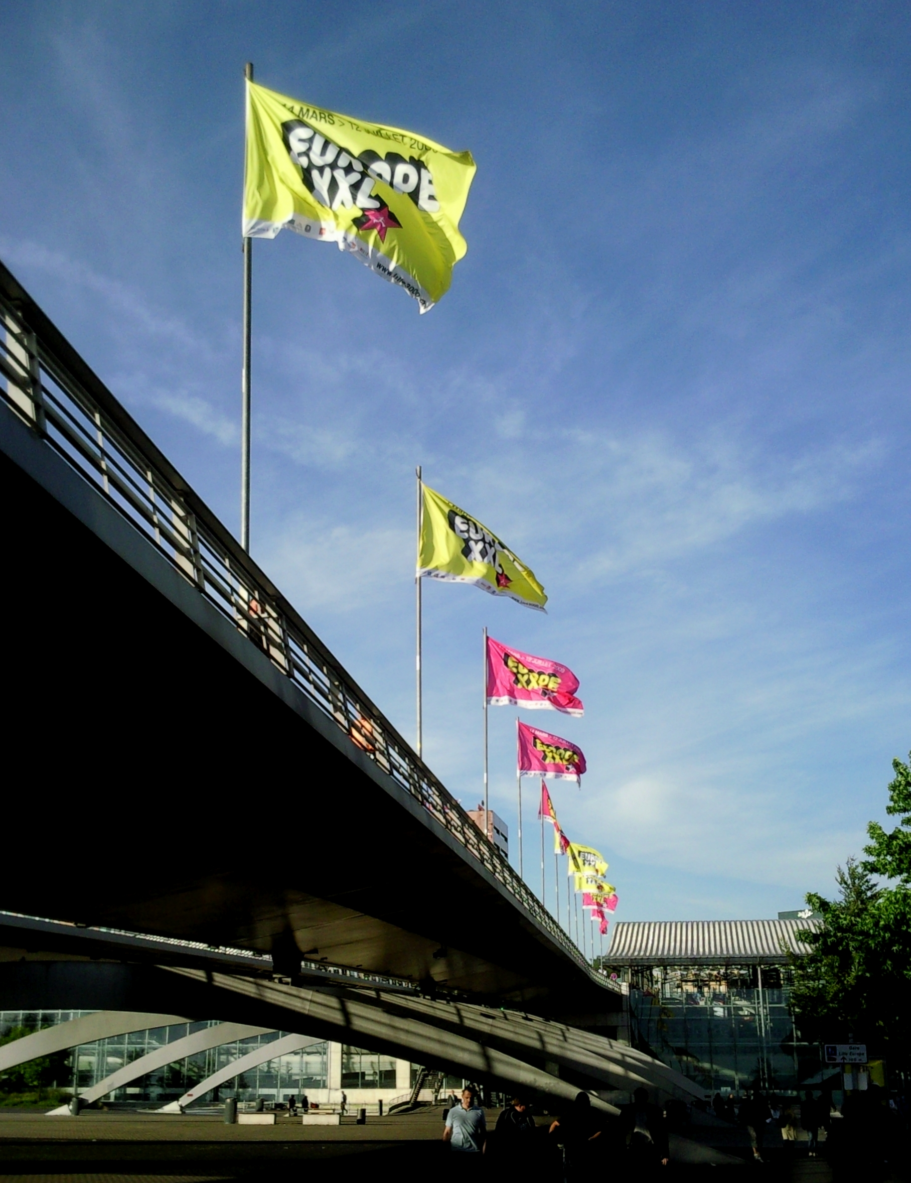 Les drapeaux de la deuxième édition de Lille 3000, Europe XXL, sur l'avenue Le Corbusier à Lille (Nord).